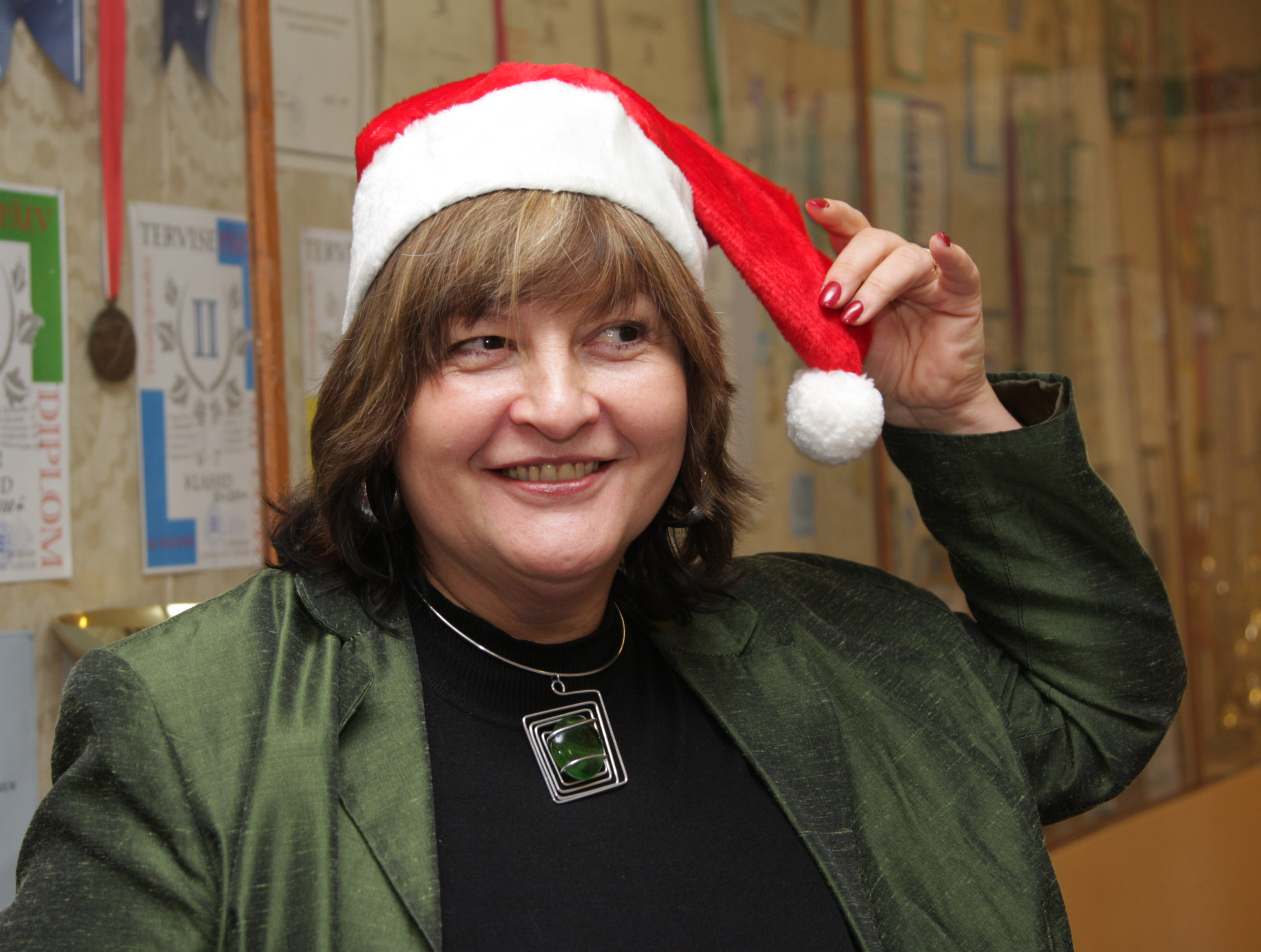 Tiina Lokk-Tramberg, filmindustegelane 2007